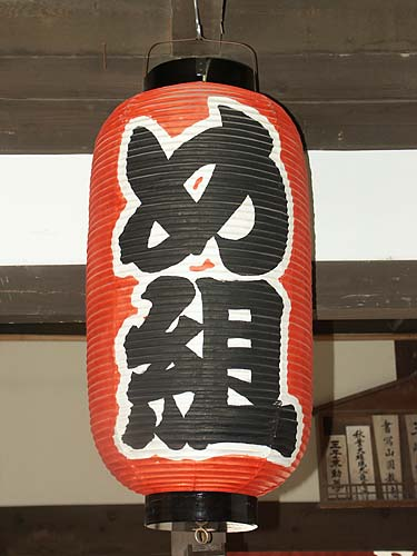 Megumi Abarembo Shogun Television series Toei Uzumasa Studios Kyoto Japan.